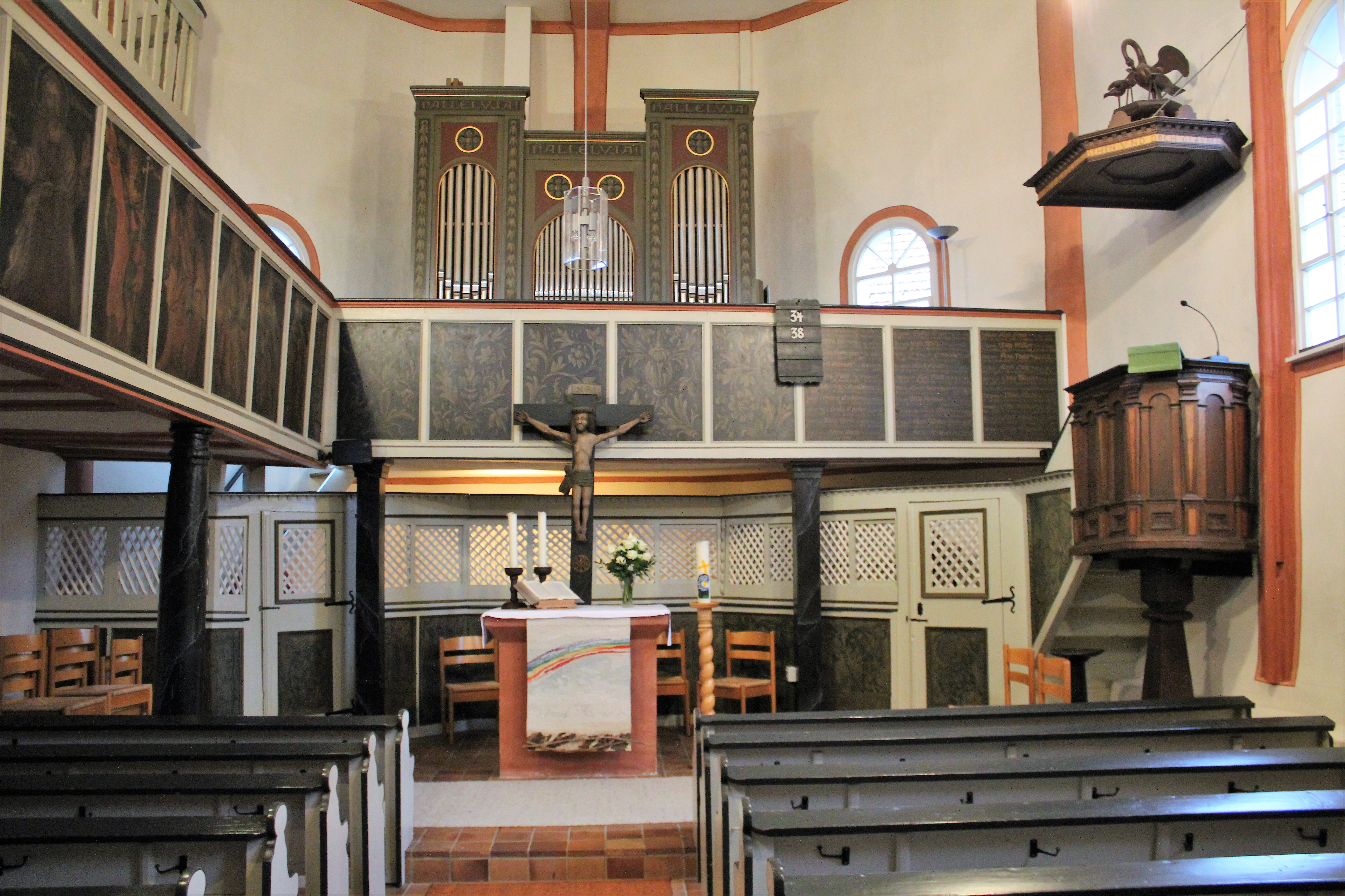 Evangelische Kirche Sellnrod, Gemeinde Mücke, Vogelsbergkreis, Hessen, Deutschland